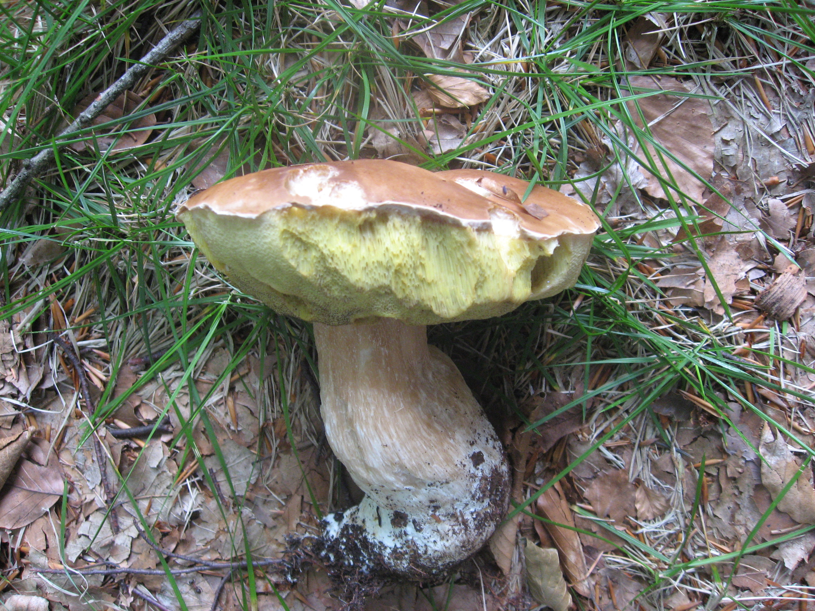 Hřib smrkový